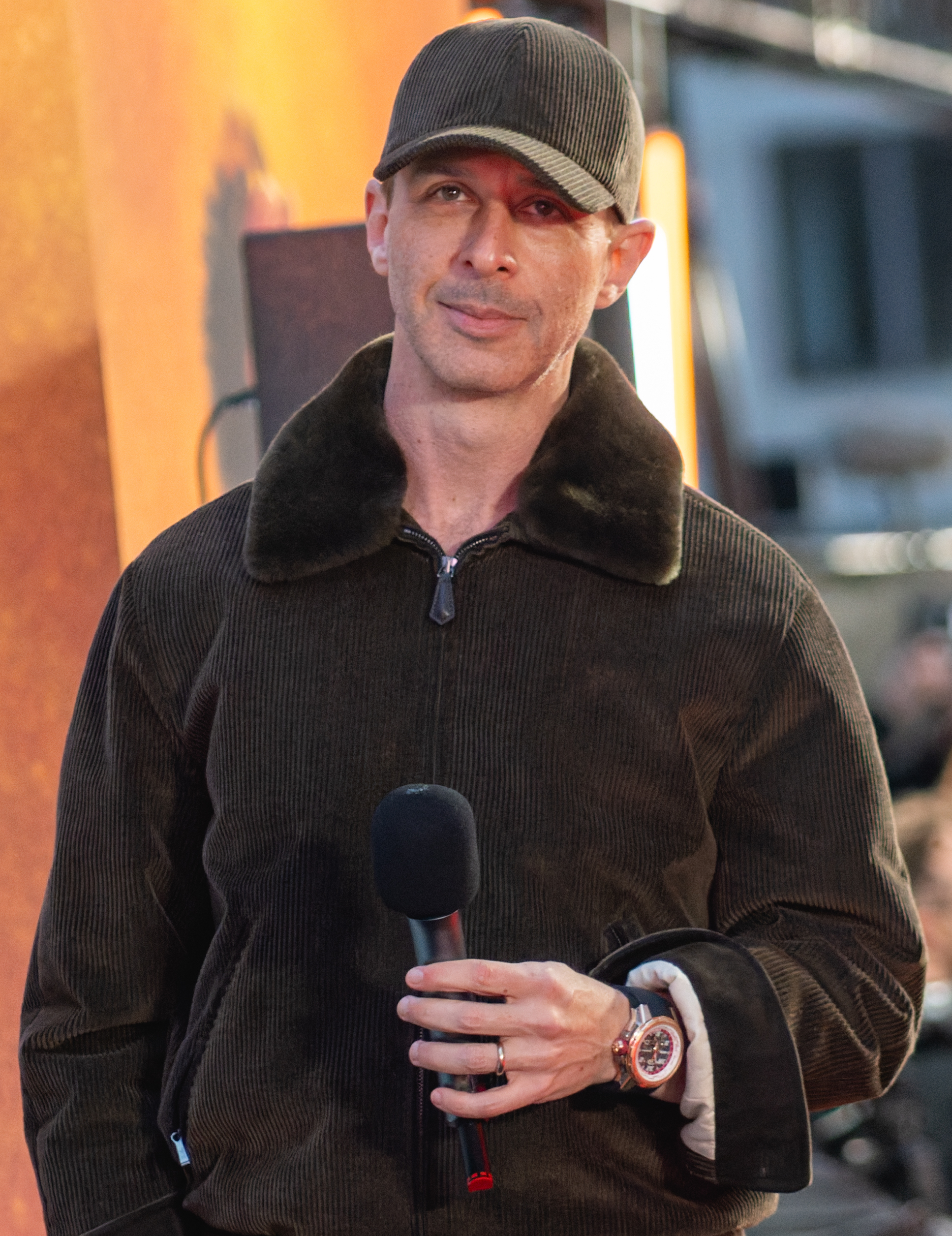 L'auteur Jeremy Strong qui prends la pause avec ses livres